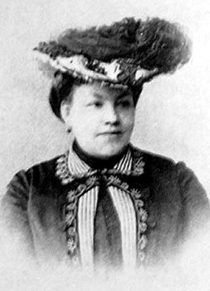 Татьяна Владимировна Перхина (дев.Финикова), супруга ювелира Михаила Евлампиевича Перхина